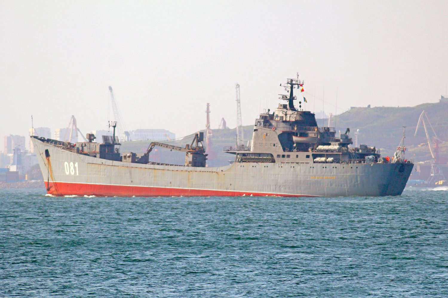 БДК Николай Вилков 2014.06.04